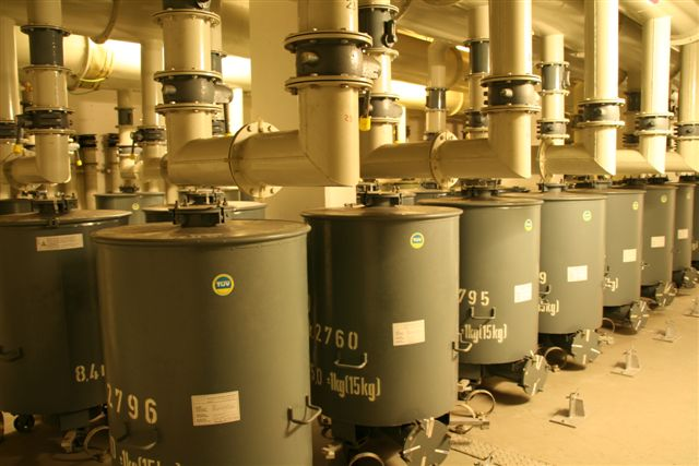 ABC-Filter in der MZA U-Bahn Haltestelle Niendorf Nord.